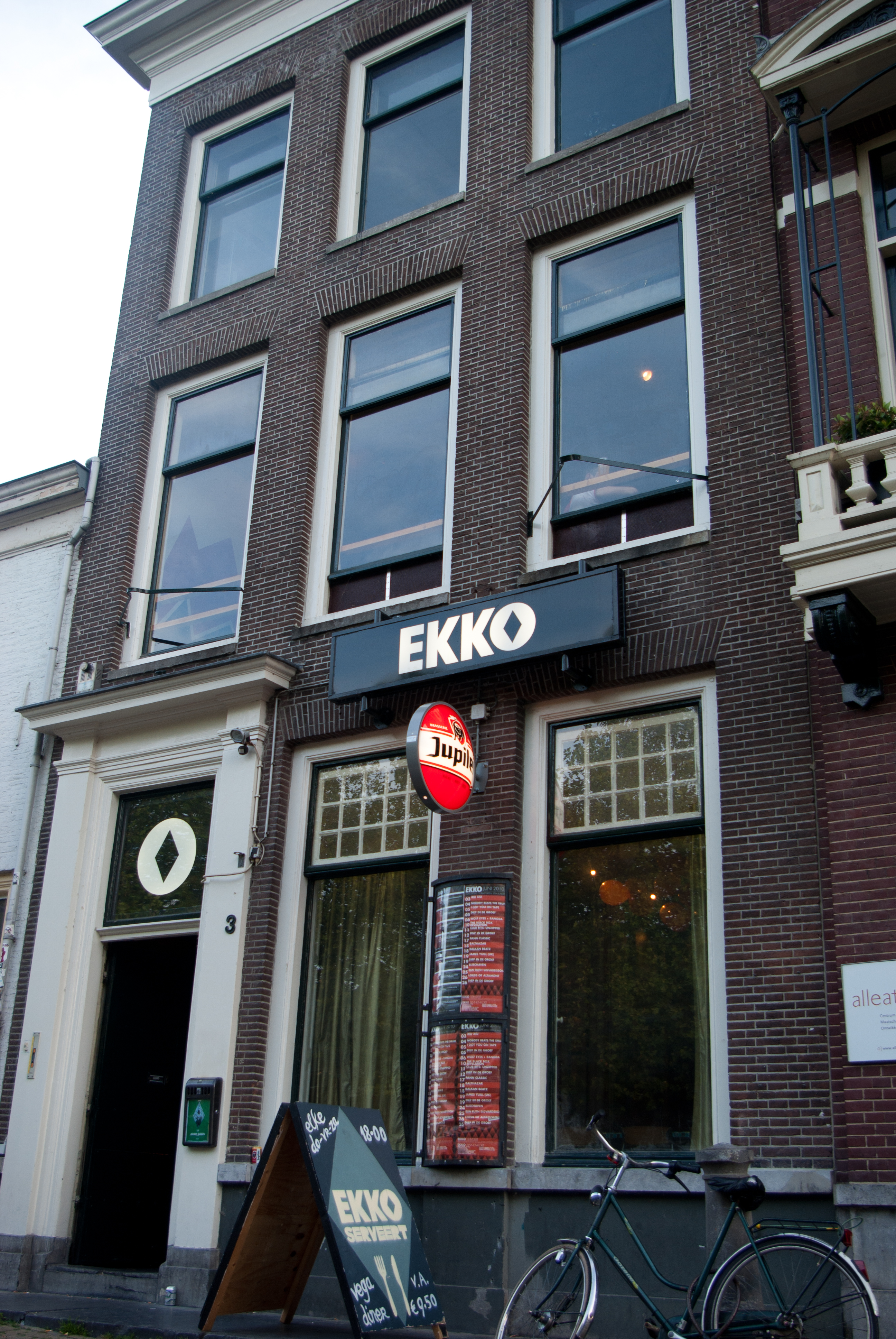 Foto van het pand van EKKO anno 2010